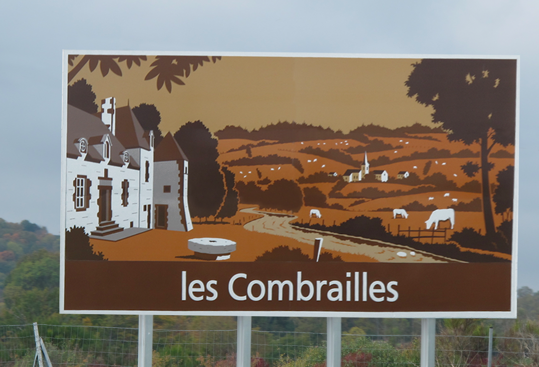 Panneau d'indication autoroutier sur l'entrée dans le pays des Combrailles